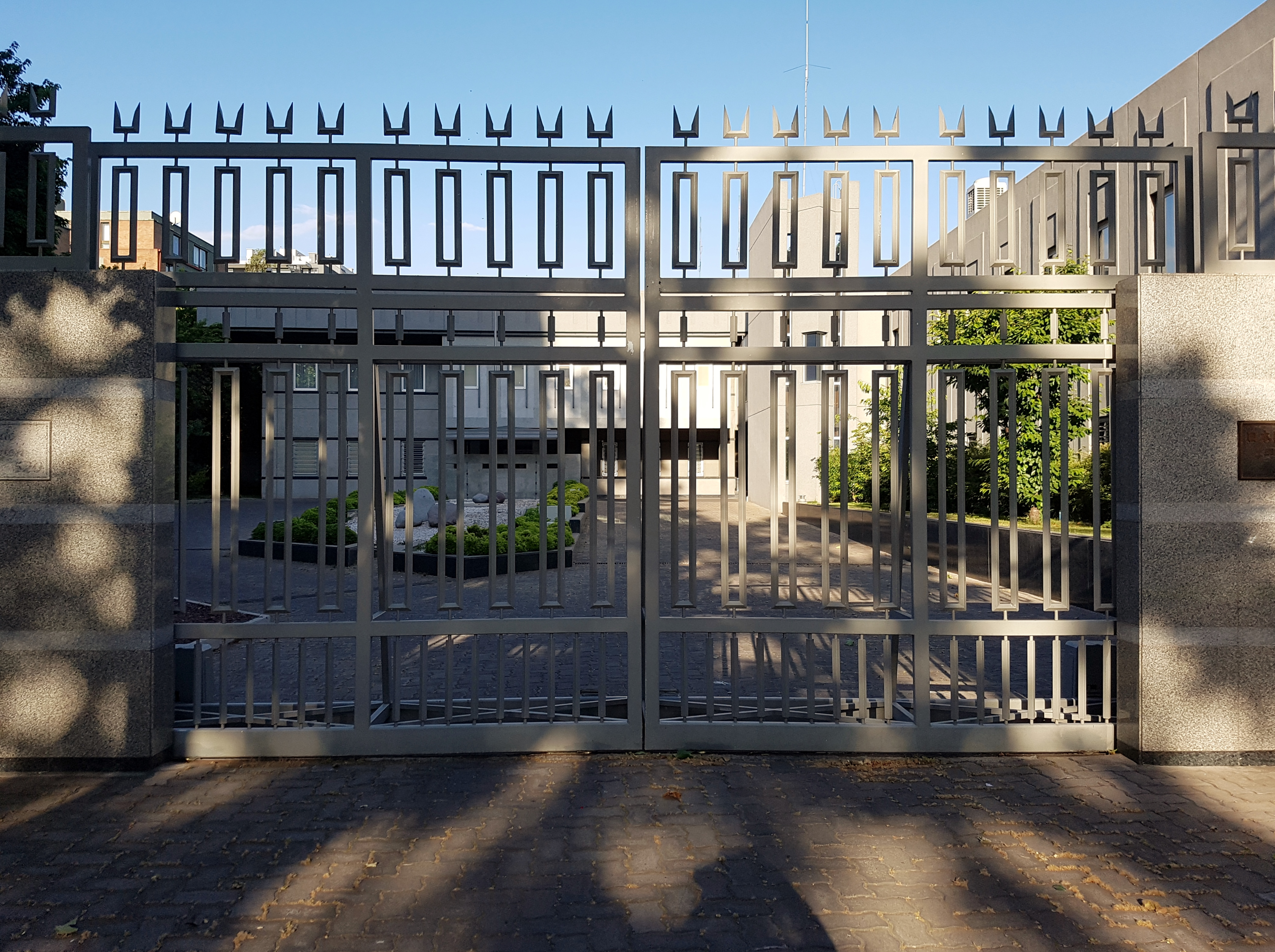 La embajada de Japón en Santiago de Chile; avenida Ricardo Lyon, comuna de Providencia.